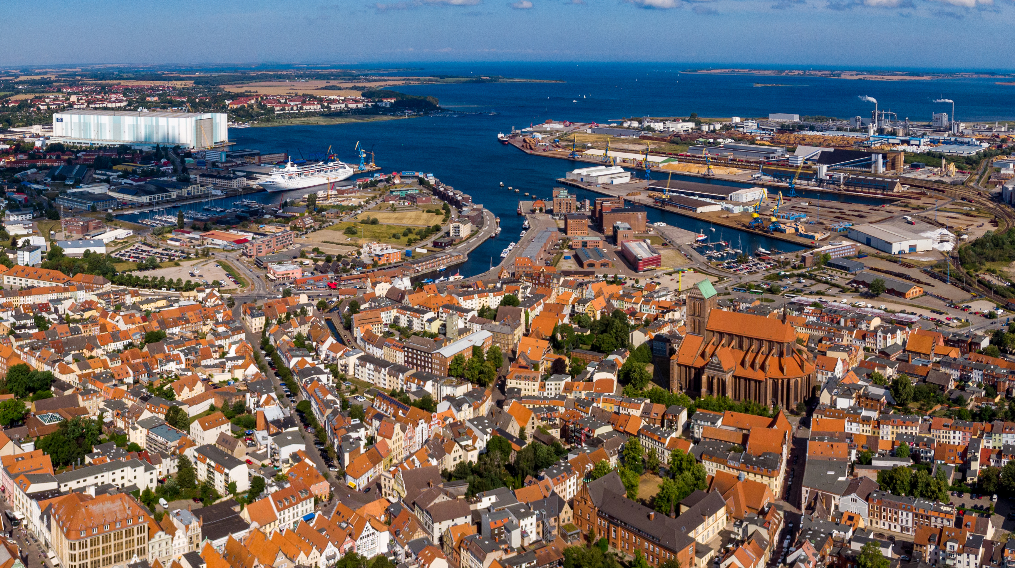 Hafen Wismar und Wismarer Bucht